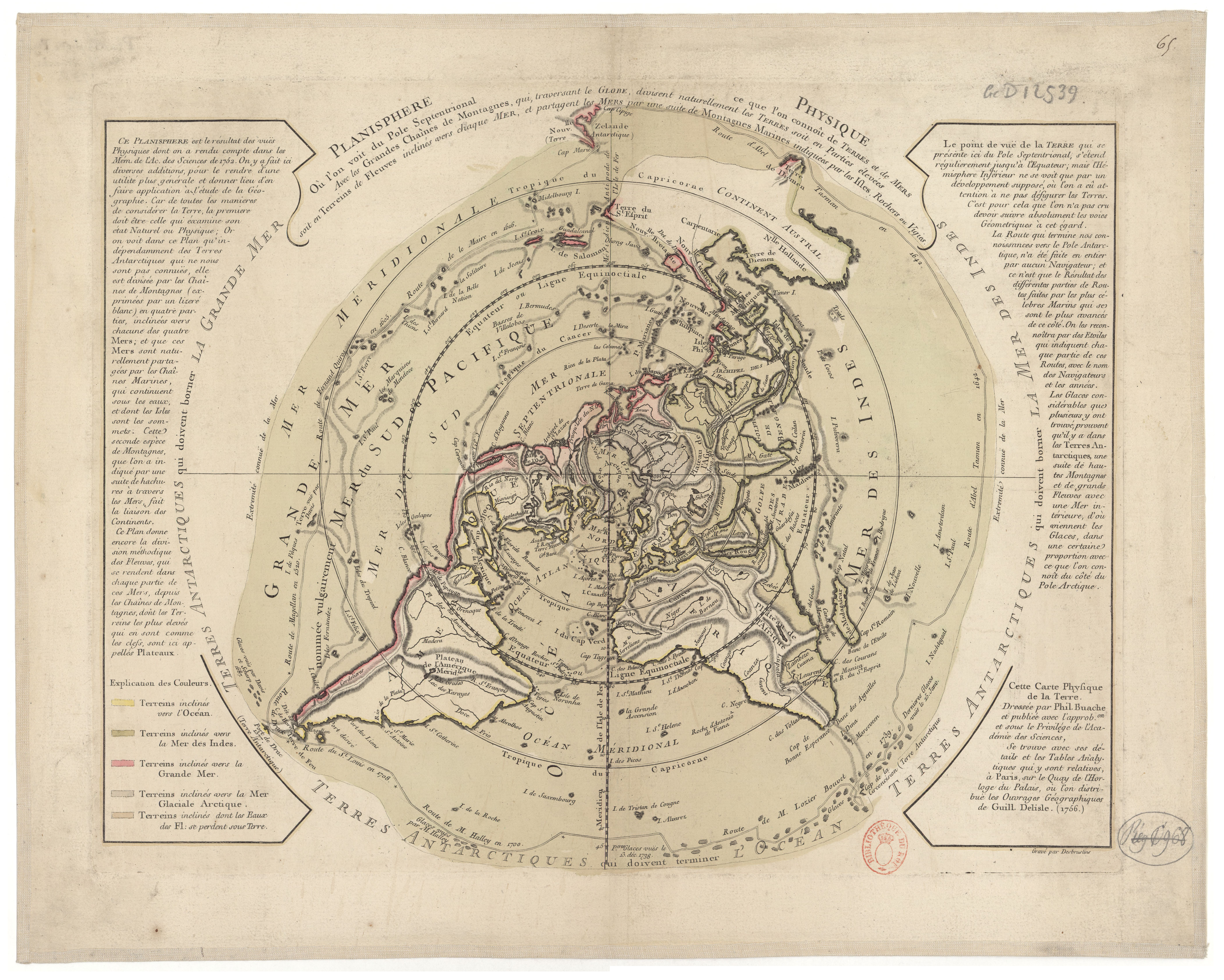 Planisphère physique où l'on voit du pôle septentrional ce que l'on connoit de terres et de mers, avec les grandes chaînes de montagnes qui traversent le globe.